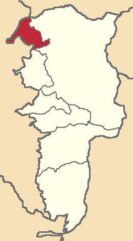 Mapa localizacor del cantón en Bolívar, Ecuador